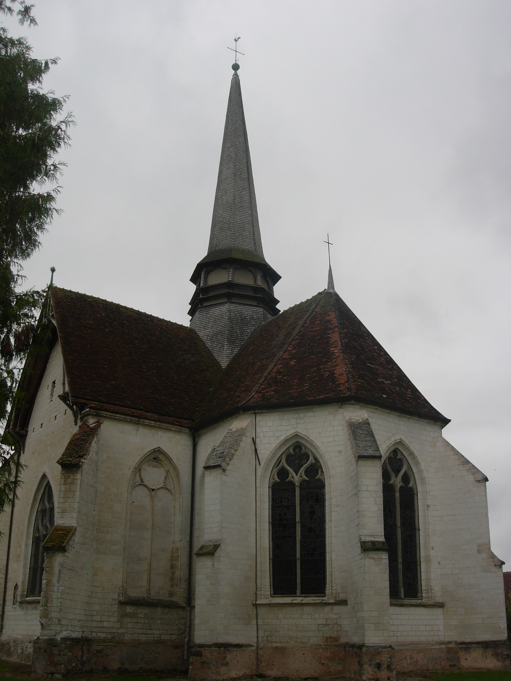 Eglise de Barberey Saint Sulpice